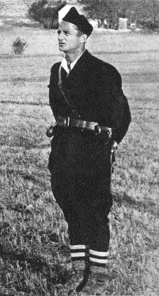 Srpskohrvatski / српскохрватски: Vicko Krstulović, organizator ustanka u Dalmaciji.